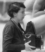 Scherl Bilderdienst Prof. h.c. Hugo Lederer 22539-30 Information added by Wikimedia users. Ausschnitt: Yva